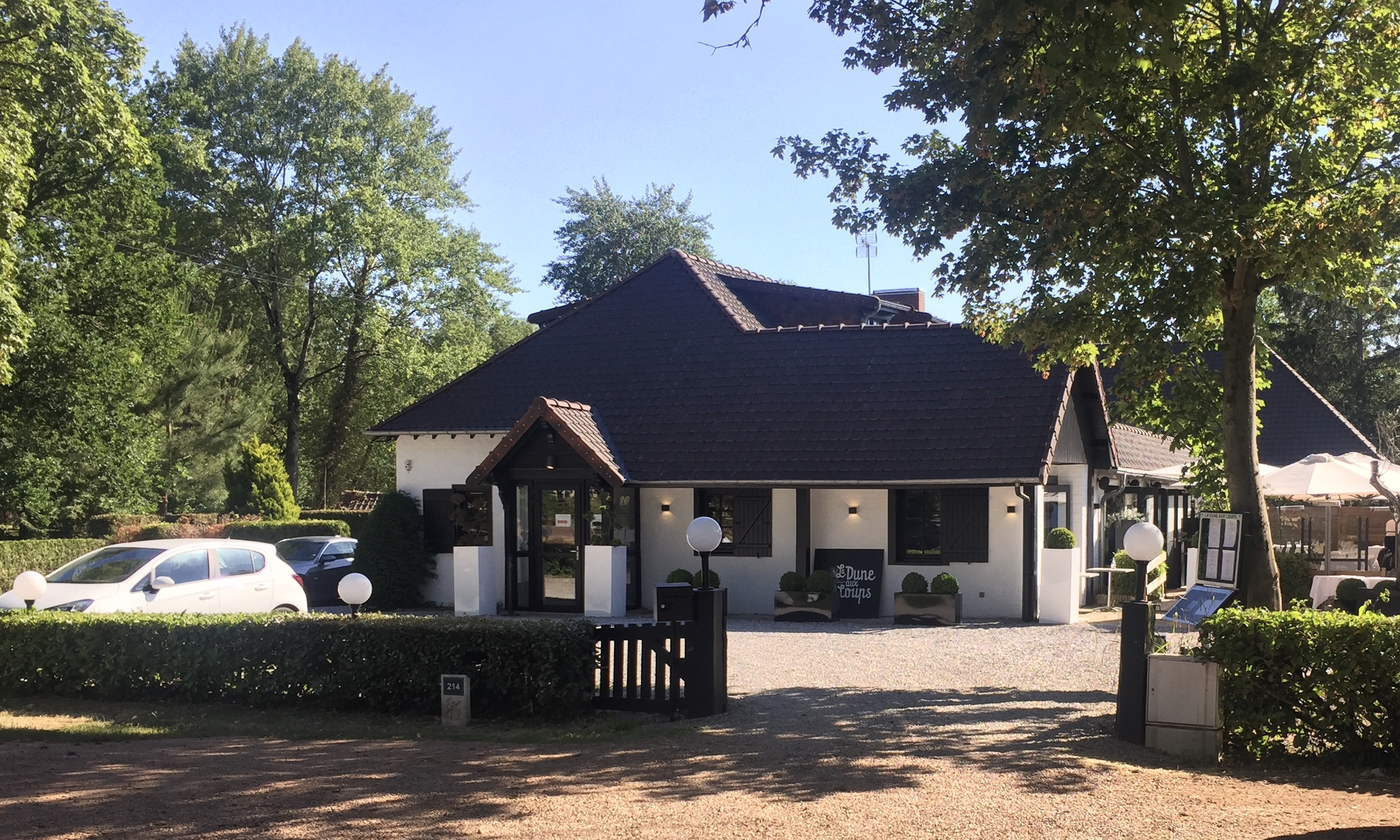 Le Touquet-Paris-Plage - auberge de la Dune-aux-Loups, construite au milieu des années 1930 - Avenue de la Dune-aux-Loups.